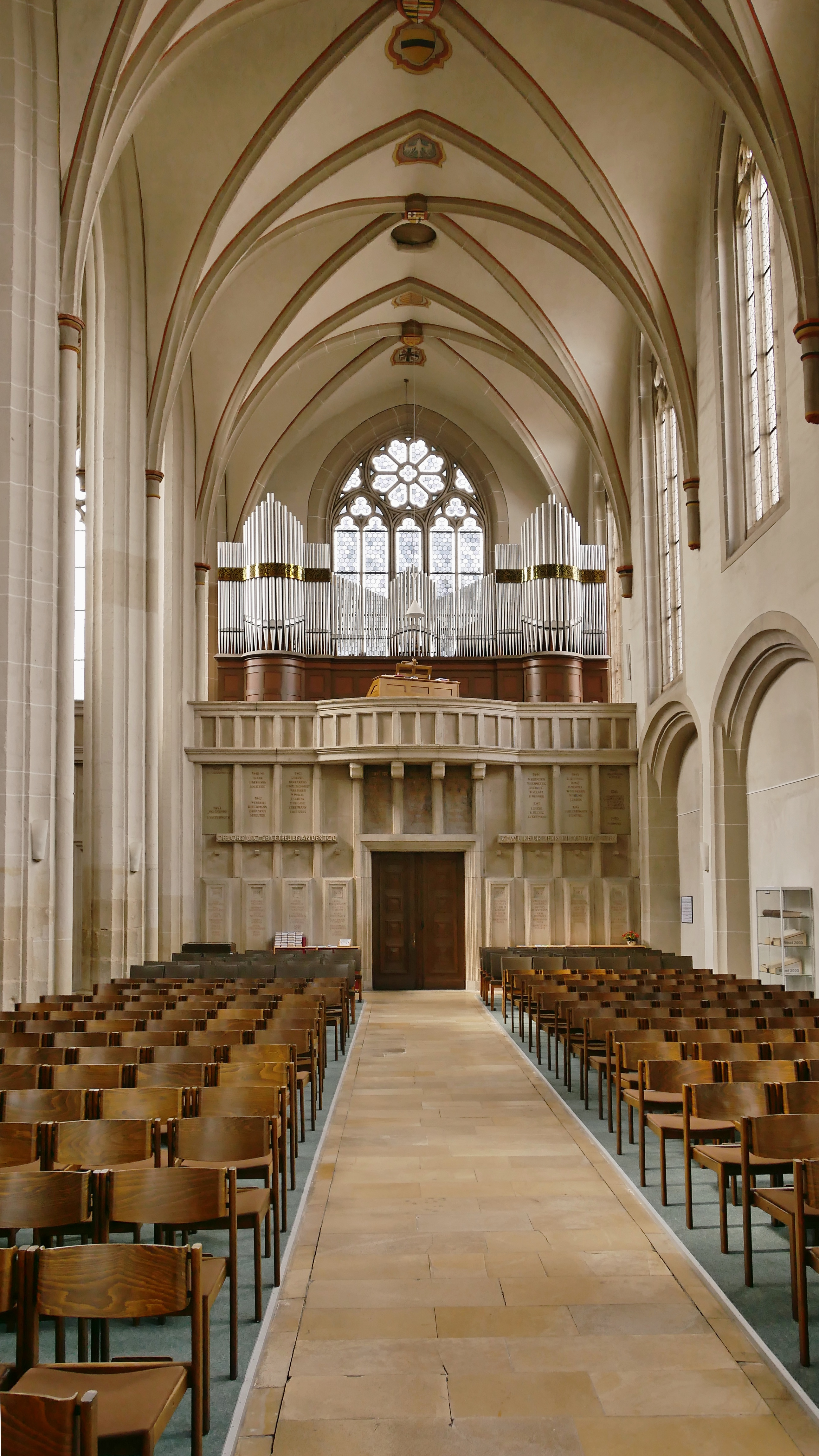 Evangelische Christuskirche Andernach - Bick zur Orgel